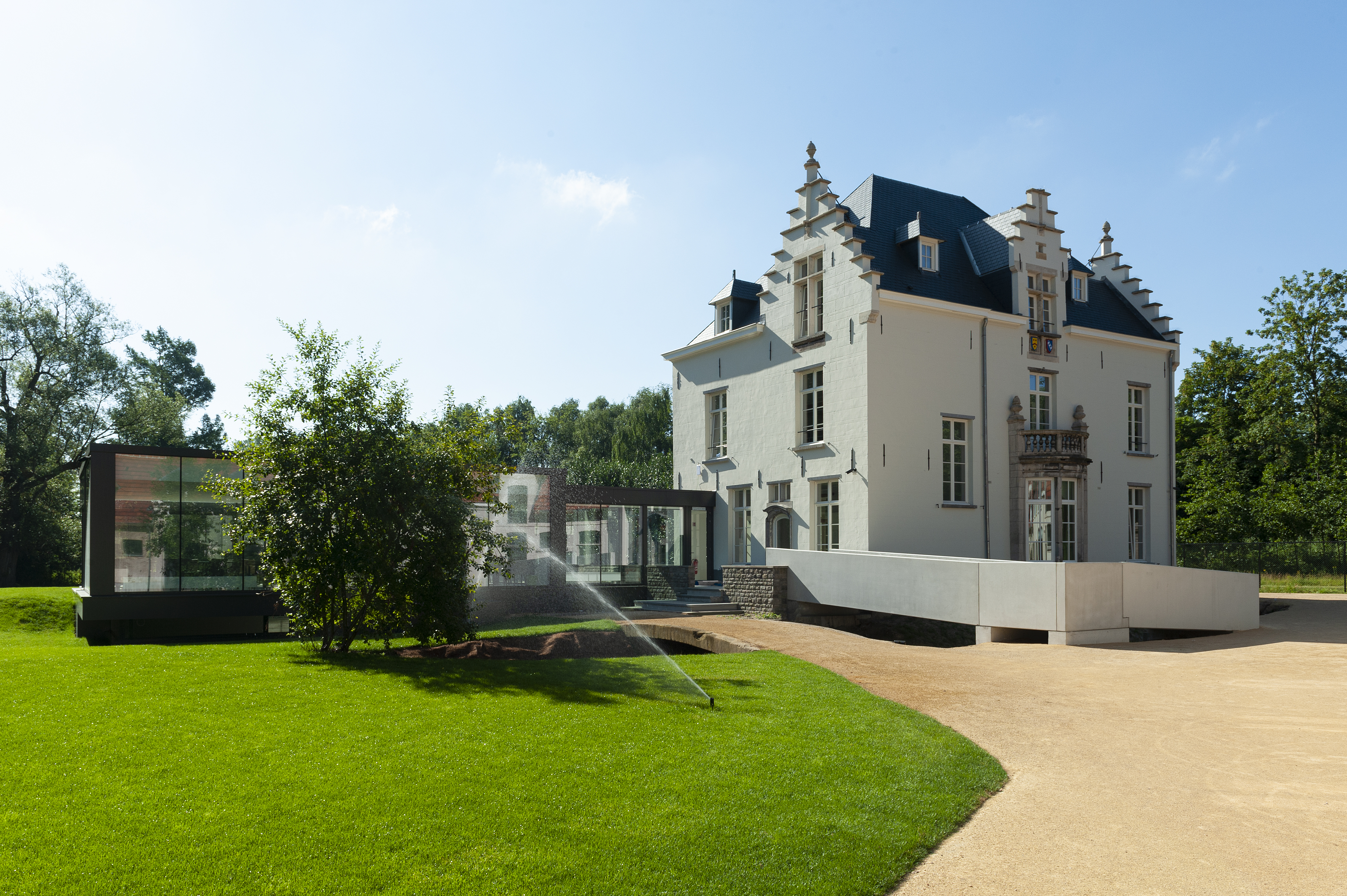 Het mooie domein van Kasteel Boterlaerhof in Deurne. Geschikt voor allerlei activiteiten.